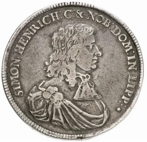 Münze der Grafschaft/Herrschaft Lippe: 1 Taler, 1672; Porträt des Simon Heinrich zur Lippe-Detmold